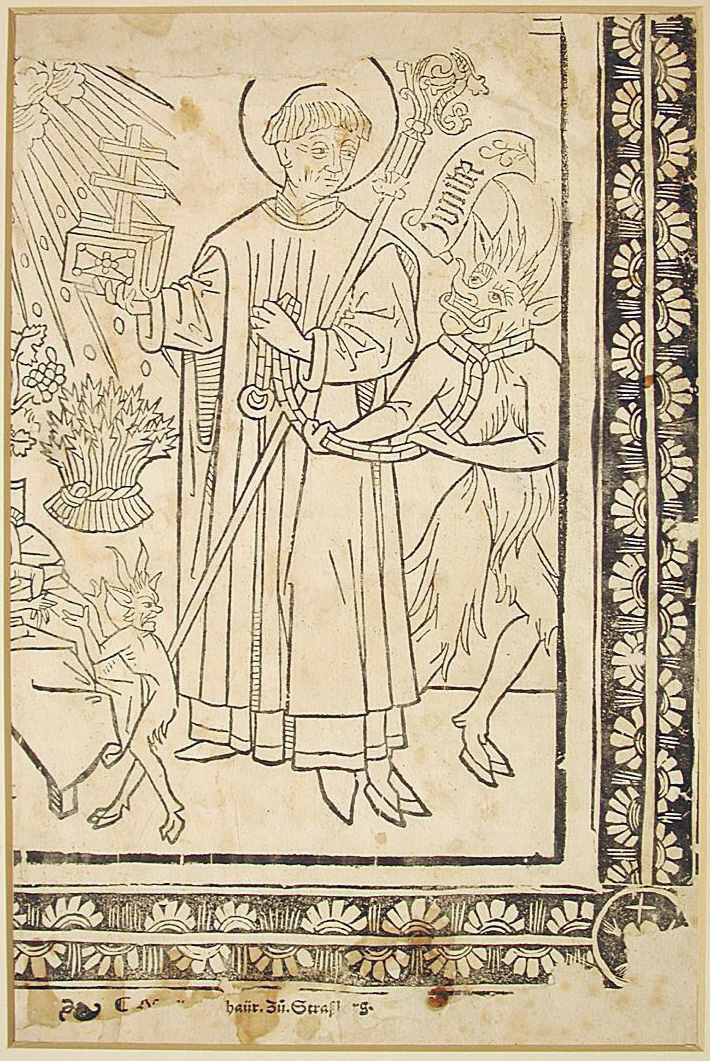 Hl. Bernhard von Menthon, Holzschnitt, um 1470